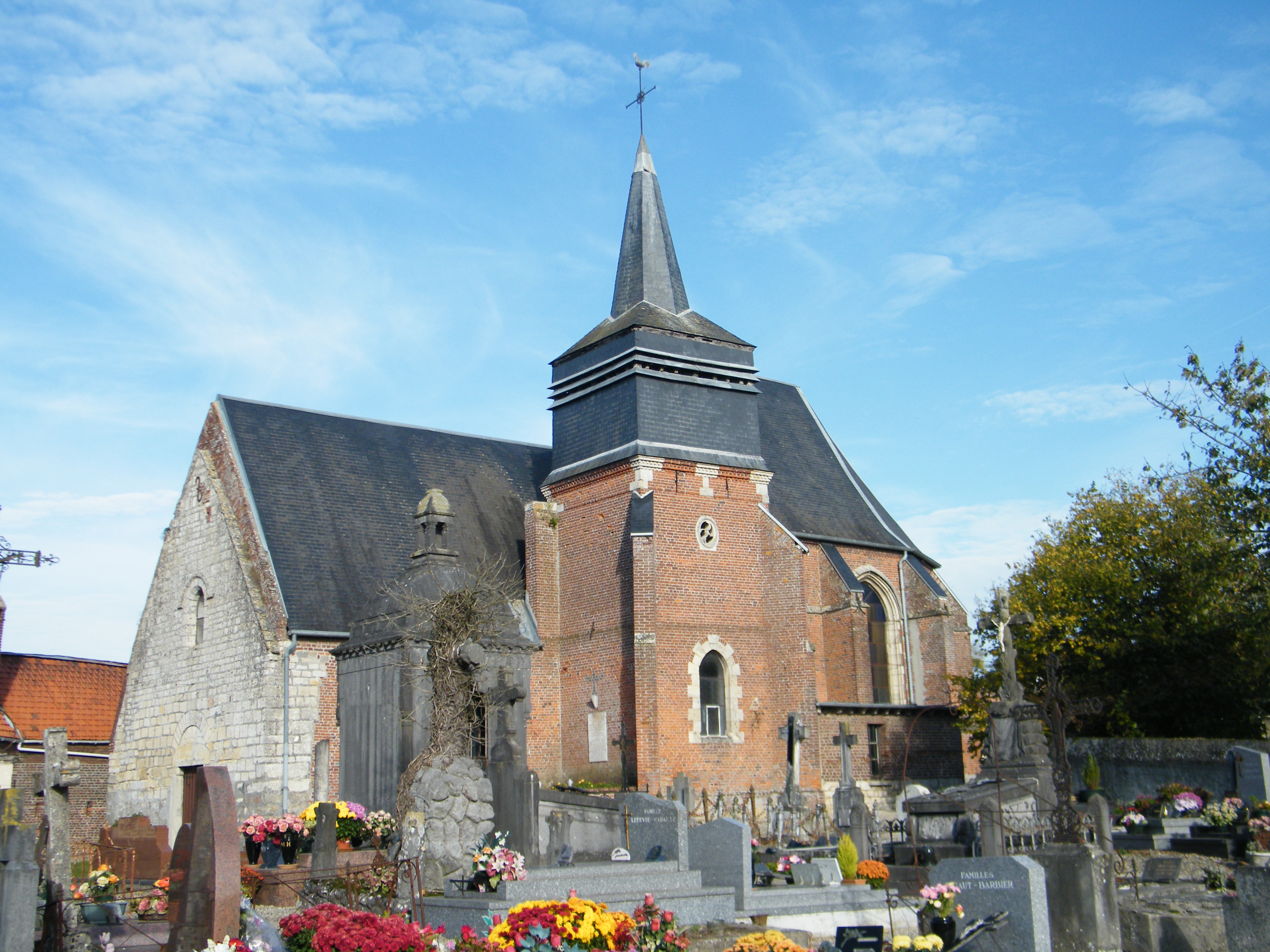 église.